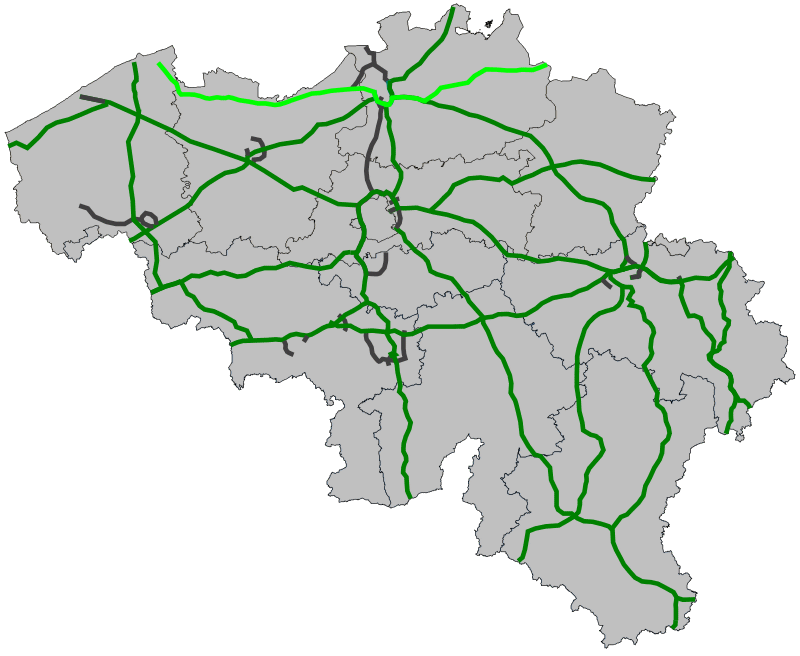 Traject Europese weg 34 door België